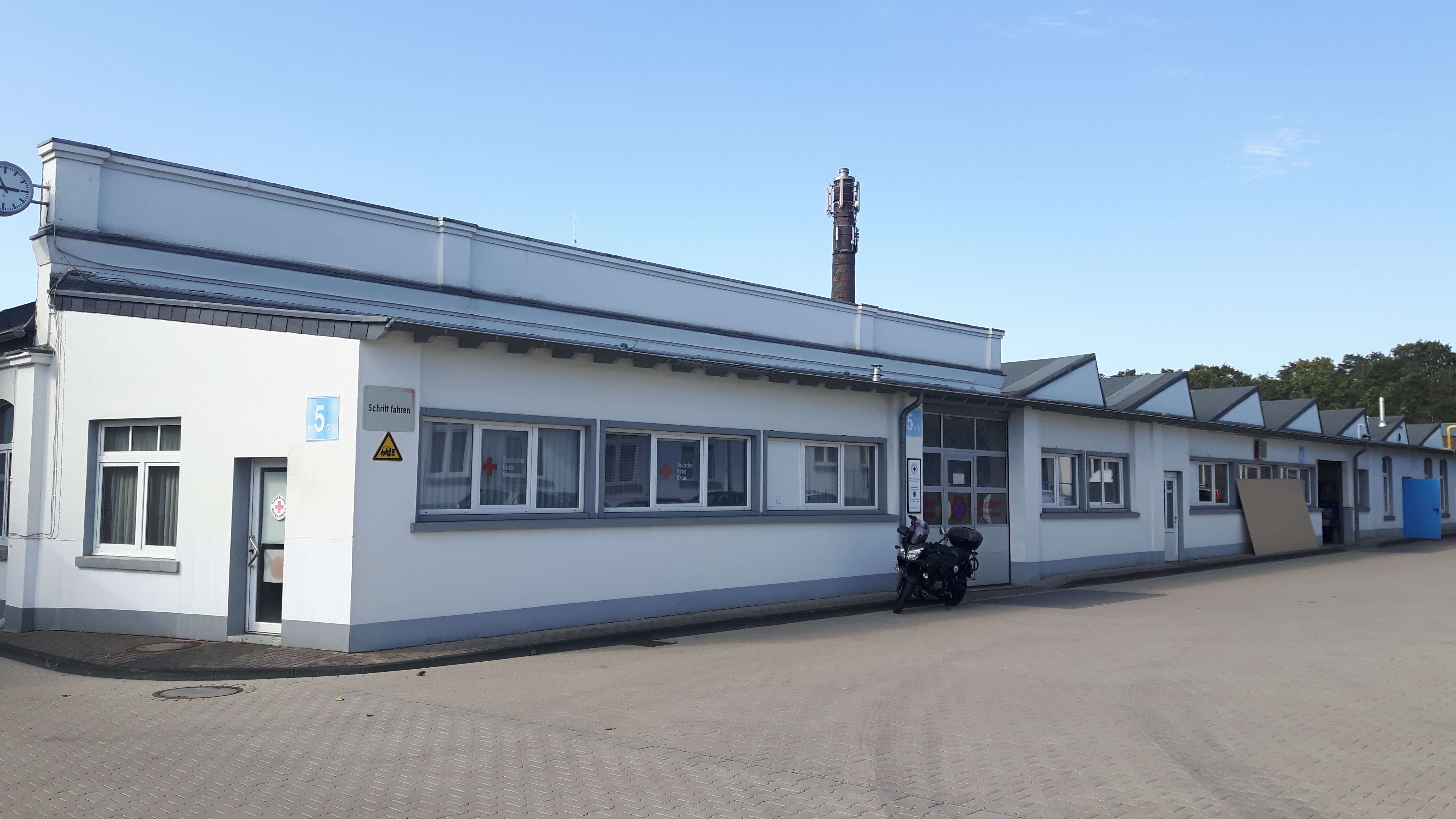 Hilden Hofstr 64, W. Bauermann & Söhne, Sheddächer